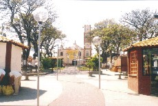 Praça Municipal de Biritiba Mirim